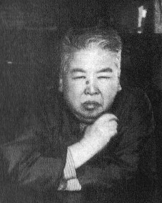 明治の女流画家 奥原晴湖肖像写真